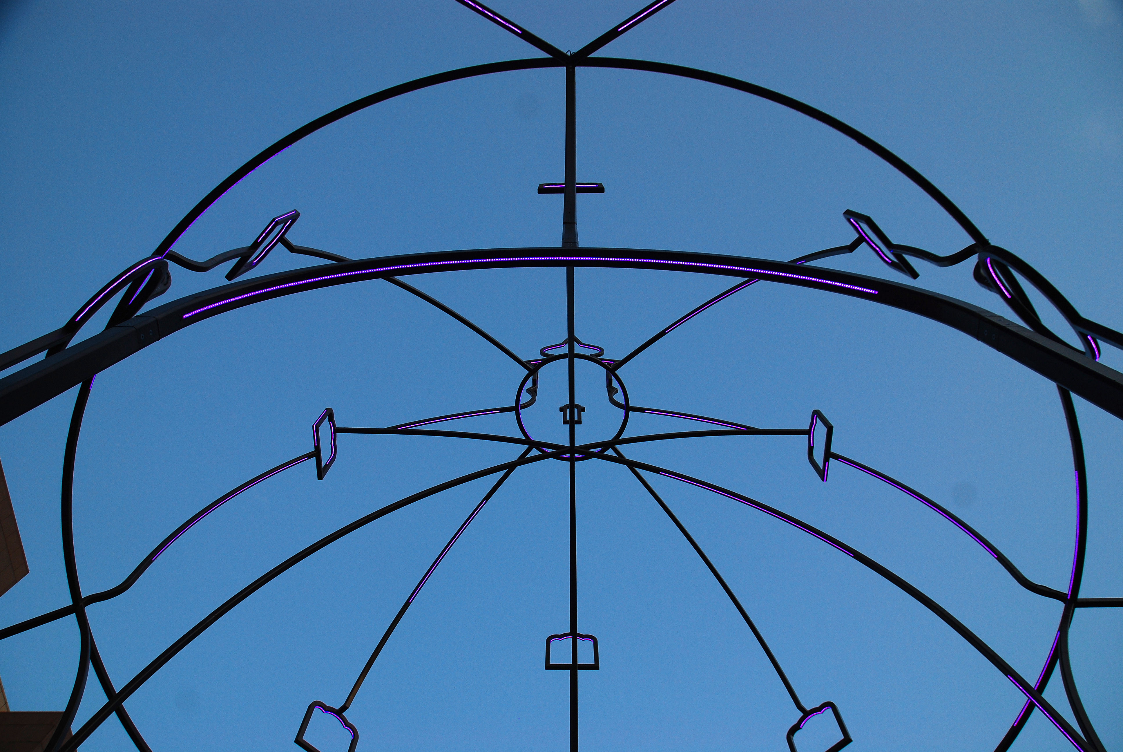 Bethlehemkirchplatz. auch: Böhmische Kirche. Abends und nachts wird wird die Rekonstruktion durch violette LED-Bänder erleuchtet; das ist Teil der Installation von Juan Garaizabal. Im Projekt Memorias Urbanas will der Künstler verlorenen Räume und Objekte einer Stadt ins Gedächtnis zurückrufen und ihre symbolische Wiedergewinnung darstellen. Zur Zeit arbeitet er an Projekten für die Städte Valencia (Palacio Real), Bukarest (Altstadt) und Berlin (Bethlehemskirche).